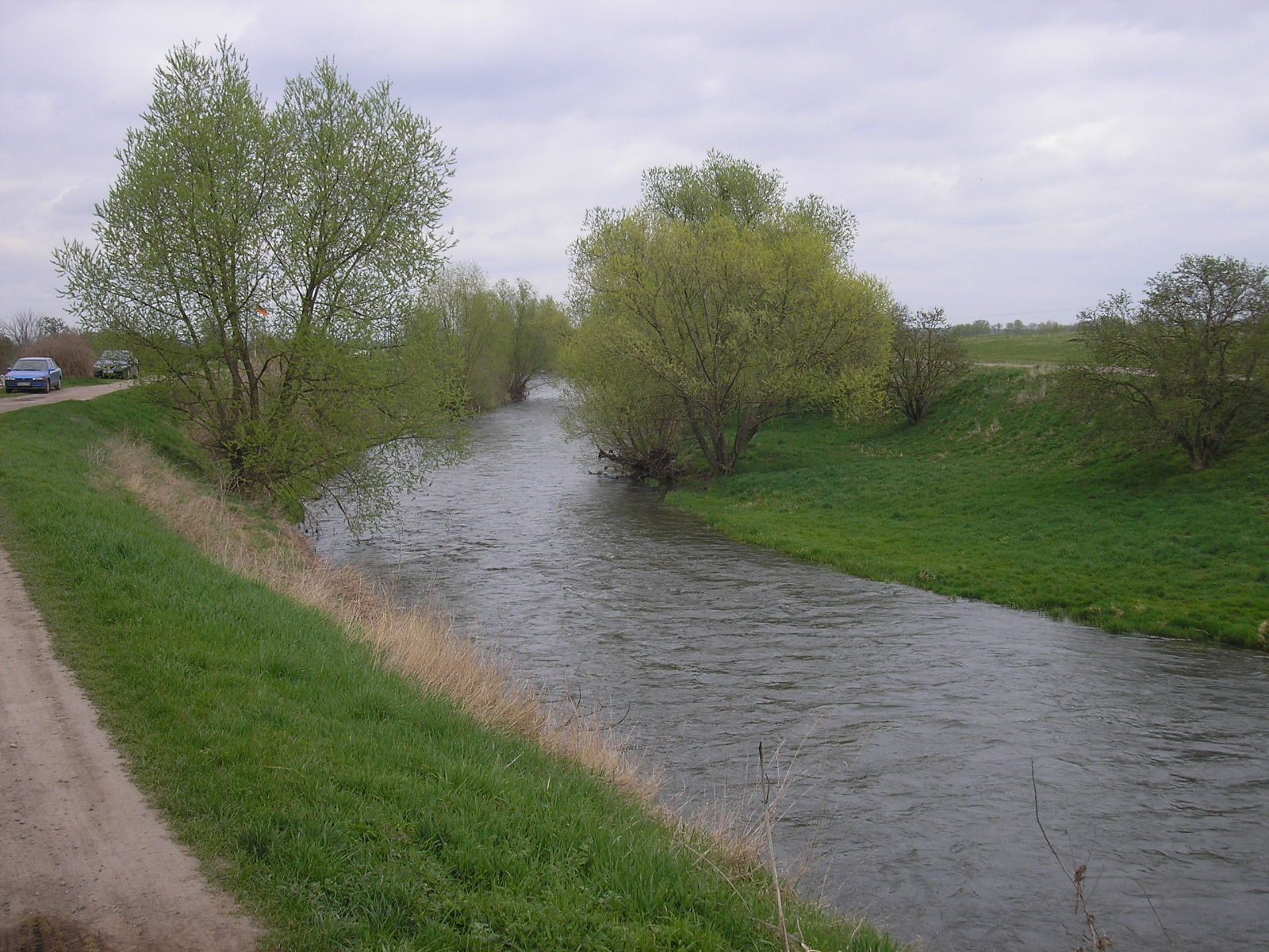 Blick auf die Gera bei Andisleben (Thüringen).